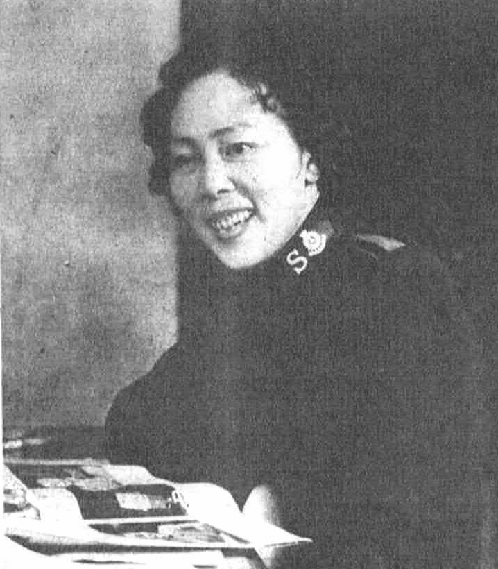 読売新聞社『家庭よみうり』334号（1953年）より山室民子